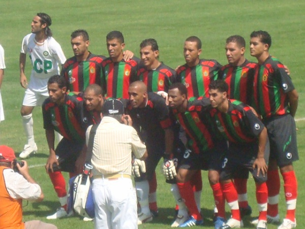 AS FAR 2009-2010 est une photo des FAR de Rabat.